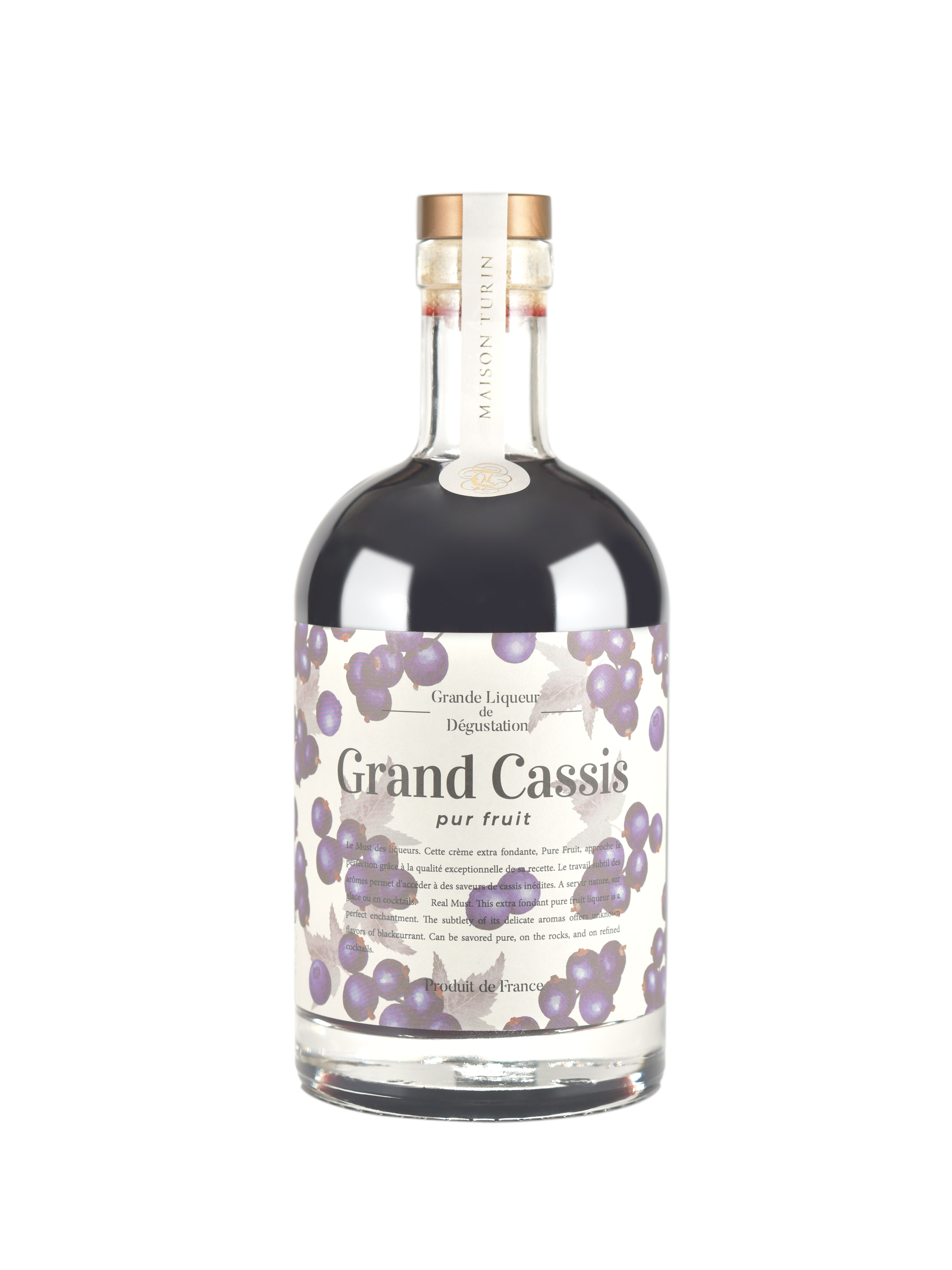 Crème de Cassis, le fleuron de l'apéritif français